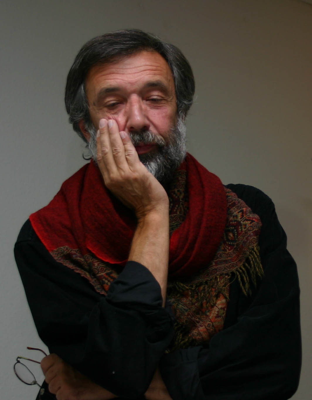 Alexander Kostinskij (* 19. Januar 1946 in Kiew, Ukraine) ist ein ukrainisch-jüdischer Dichter, Schriftsteller und Illustrator.